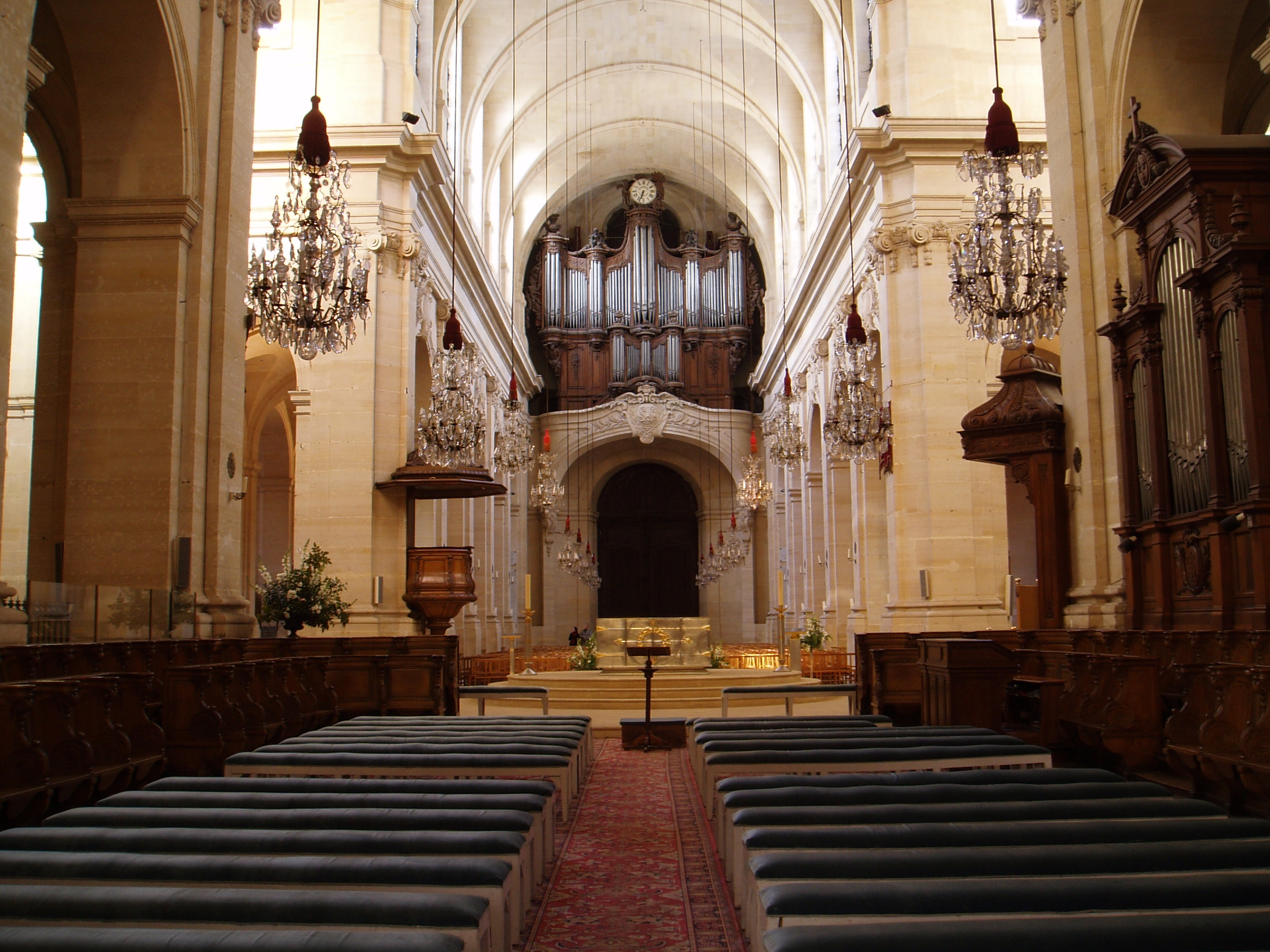 Cathédrale Saint Louis de Versailles Architecte : Jules Hardouin Masart de Sagonne Construction : 12 juin 1743 Inauguration : 24 août 1754 consacrée cathédrale en 1843 Orgue : Clicquot (1760) , Cavaillé-Coll This object is classé Monument Historique in the base Palissy, database of the French furniture patrimony of the French ministry of culture, under the references PM78000862, PM78000801 and PM78000745.